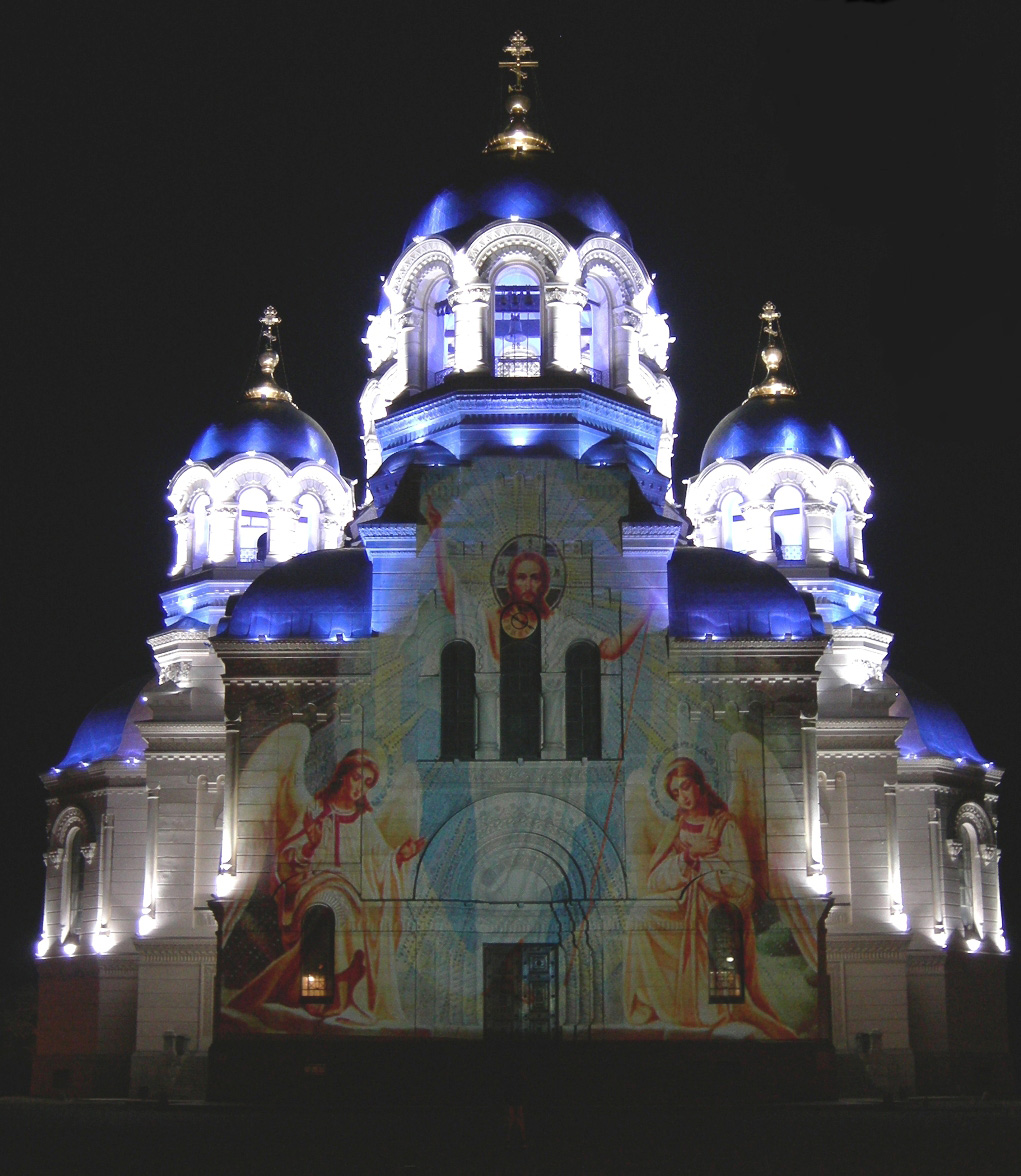 Вознесенский Кафедральный собор в Новочеркасске в ночное время